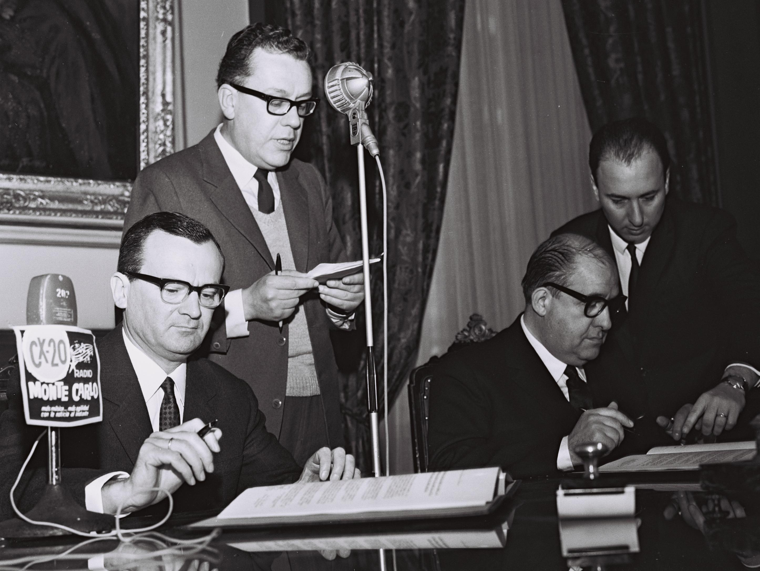 מימין: שר החוץ האורוגוואי , לואיז וידל זאגאליו ומשמאל: חגי דיקן , שגריר ישראל באורוגוואי